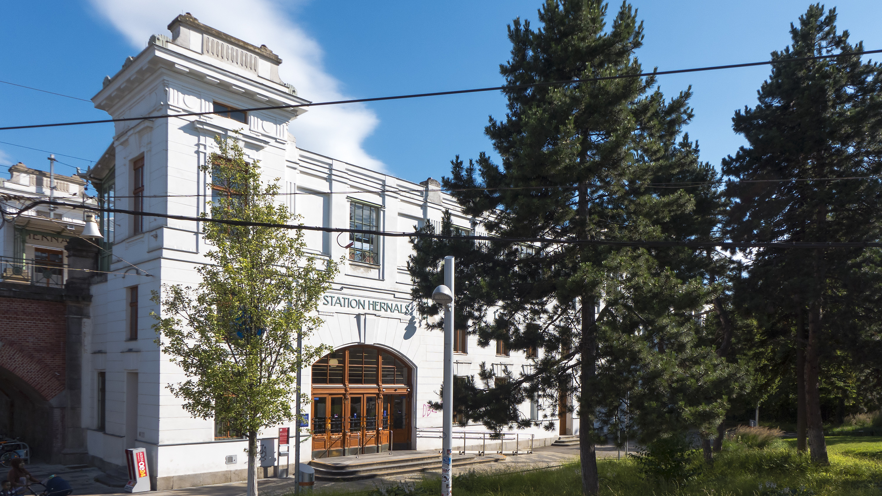 Bahnhof Wien Hernals in Wien 17